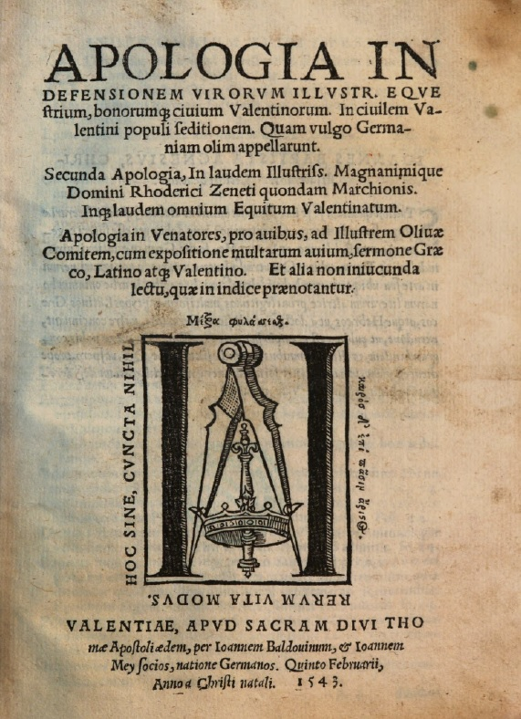 Portada de l'obra "Apología in defensionem virorum" (1543) de Joan Baptista Anyés. Valentiae : apud sacram diui Thomae Apostoli aedem : per Ioannem Baldouinum, et Ioannem Mey socios, natione Germanos, 1543, Quinto Februarii